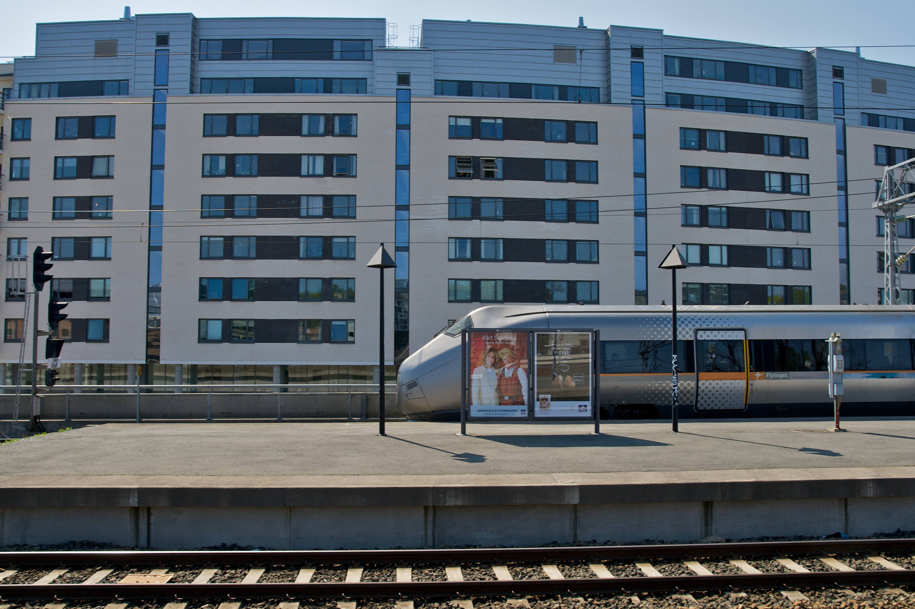 Skøyen stasjon i Oslo.